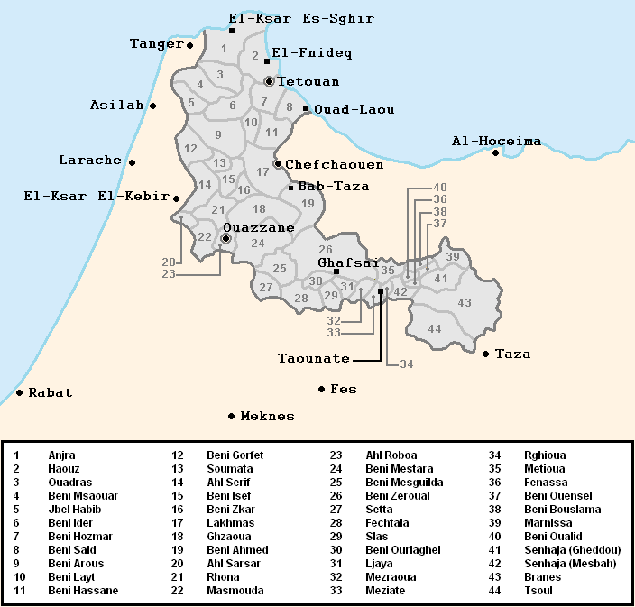 Carte des tribus Jbalas avec légende Selon: A. Zouggari & J. Vignet-Zunz, « Jbala: Histoire et société », Sciences Humaines (1991), ISBN:2-222-04574-6